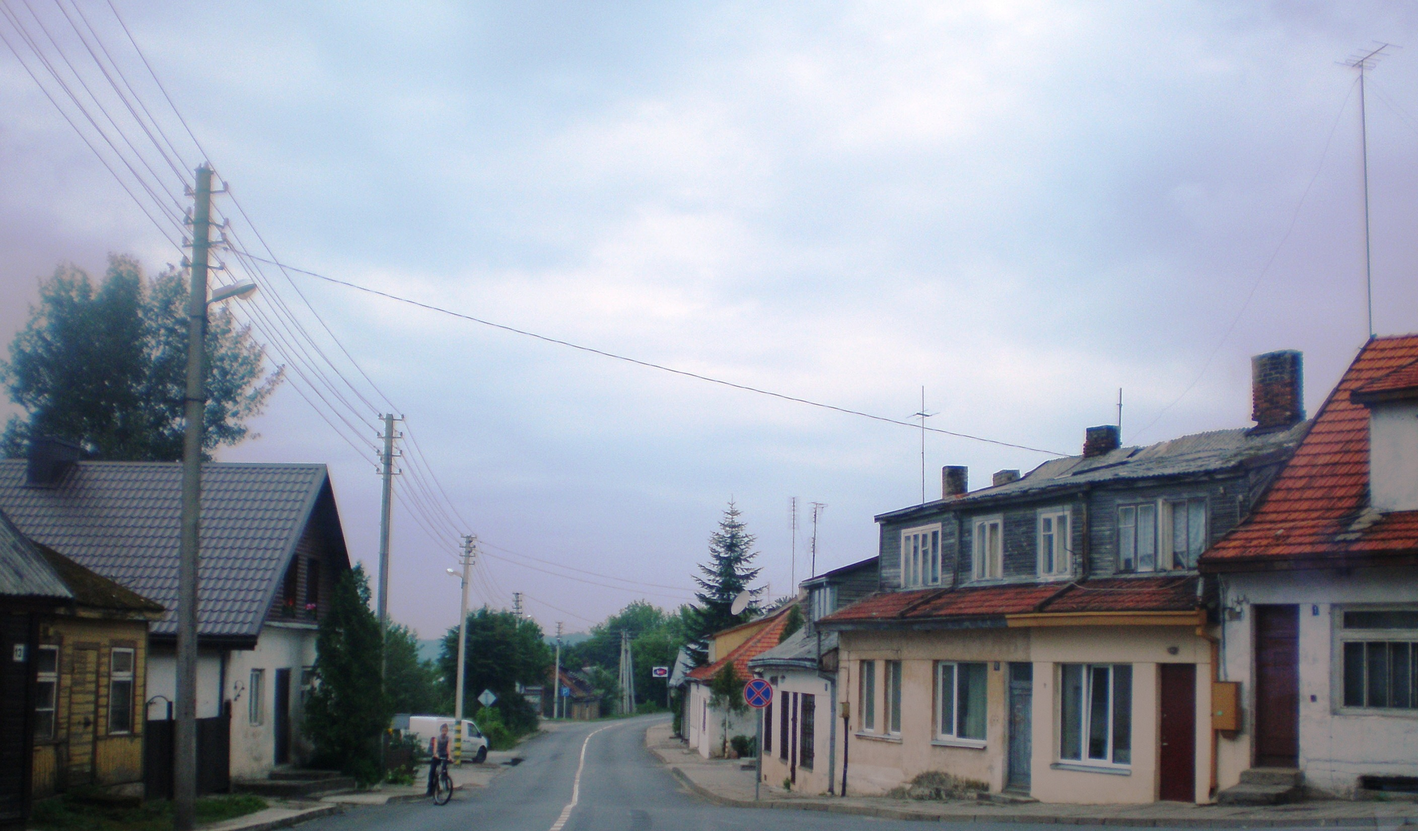 Vilkija city, Lithuania